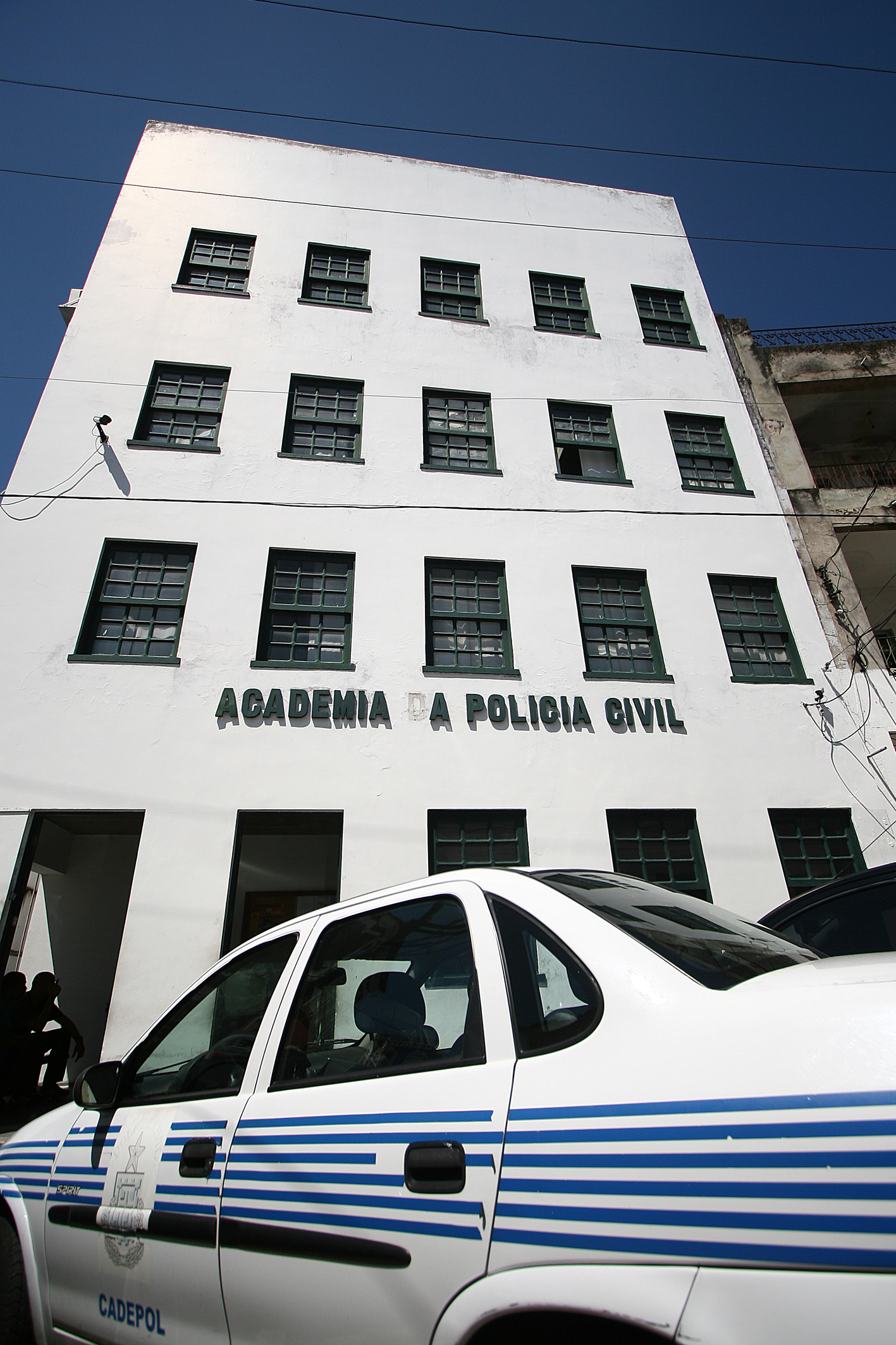 ACADEPOL Curso de capacitação de delegados para atuação no carnaval 2011 Na foto: ACADEPOL Foto: Ronaldo Silva/AGECOM